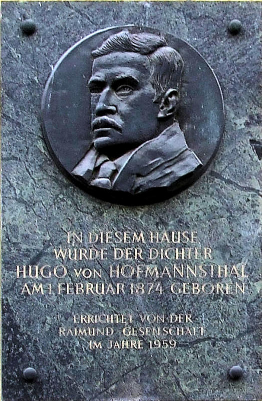 Gedenktafel angebracht am Geburtshaus von Hugo von Hofmannsthal im 3. Bezirk in Wien.